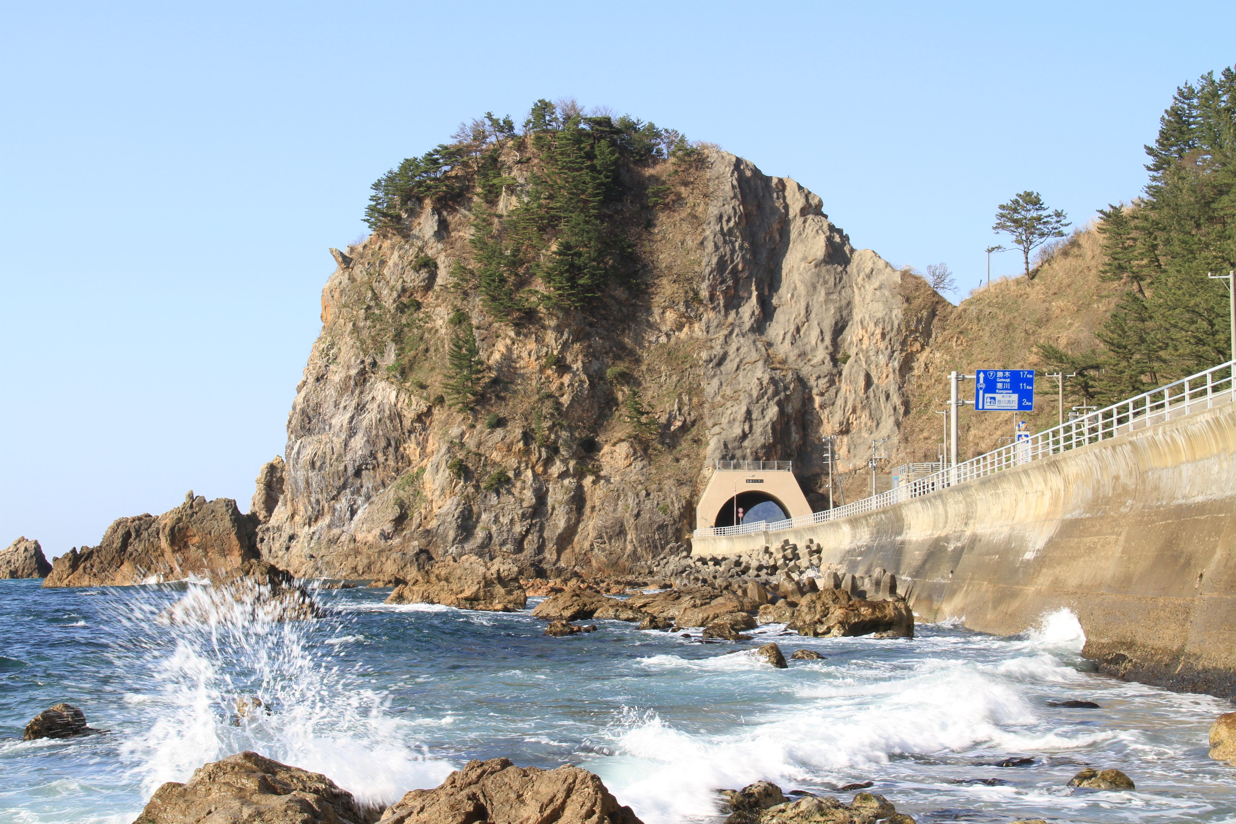 Maoroshi, Murakami, Niigata Prefecture 958-0001, Japan